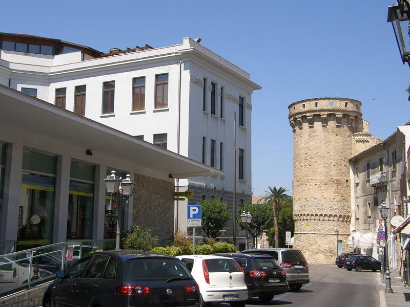 Vasto